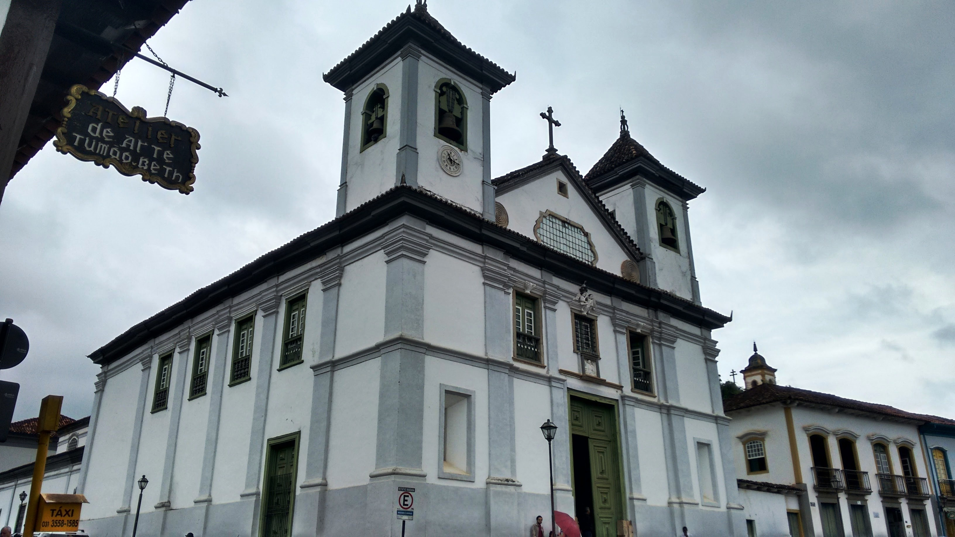 Igreja da Sé